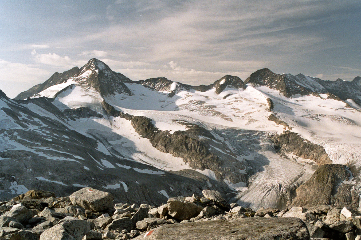 Der Große Geiger von Norden, vom Keeskogel aus gesehen